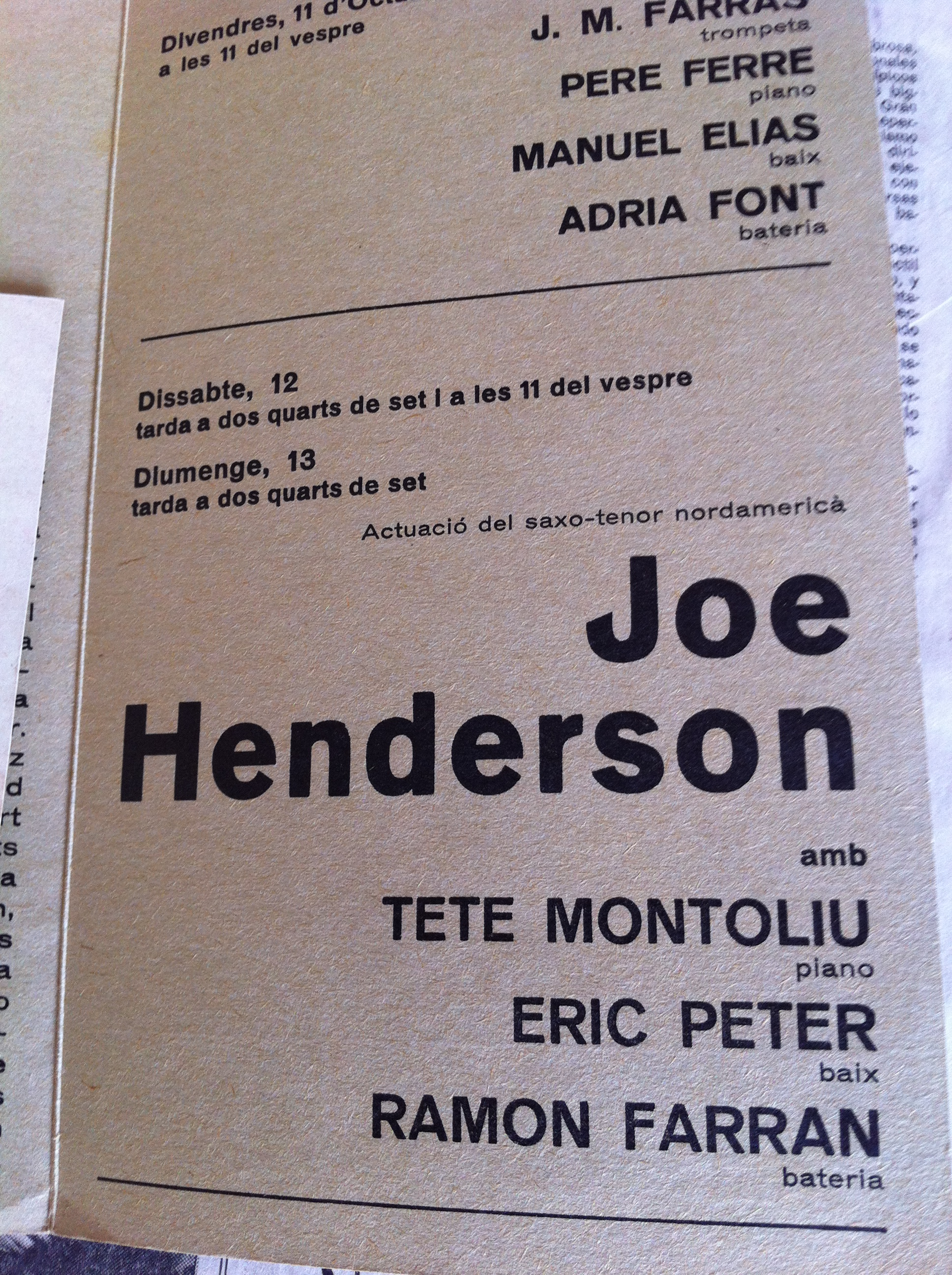 Listado de músicos que tocan el concierto entre los que figura Ramón Farrán como baterista